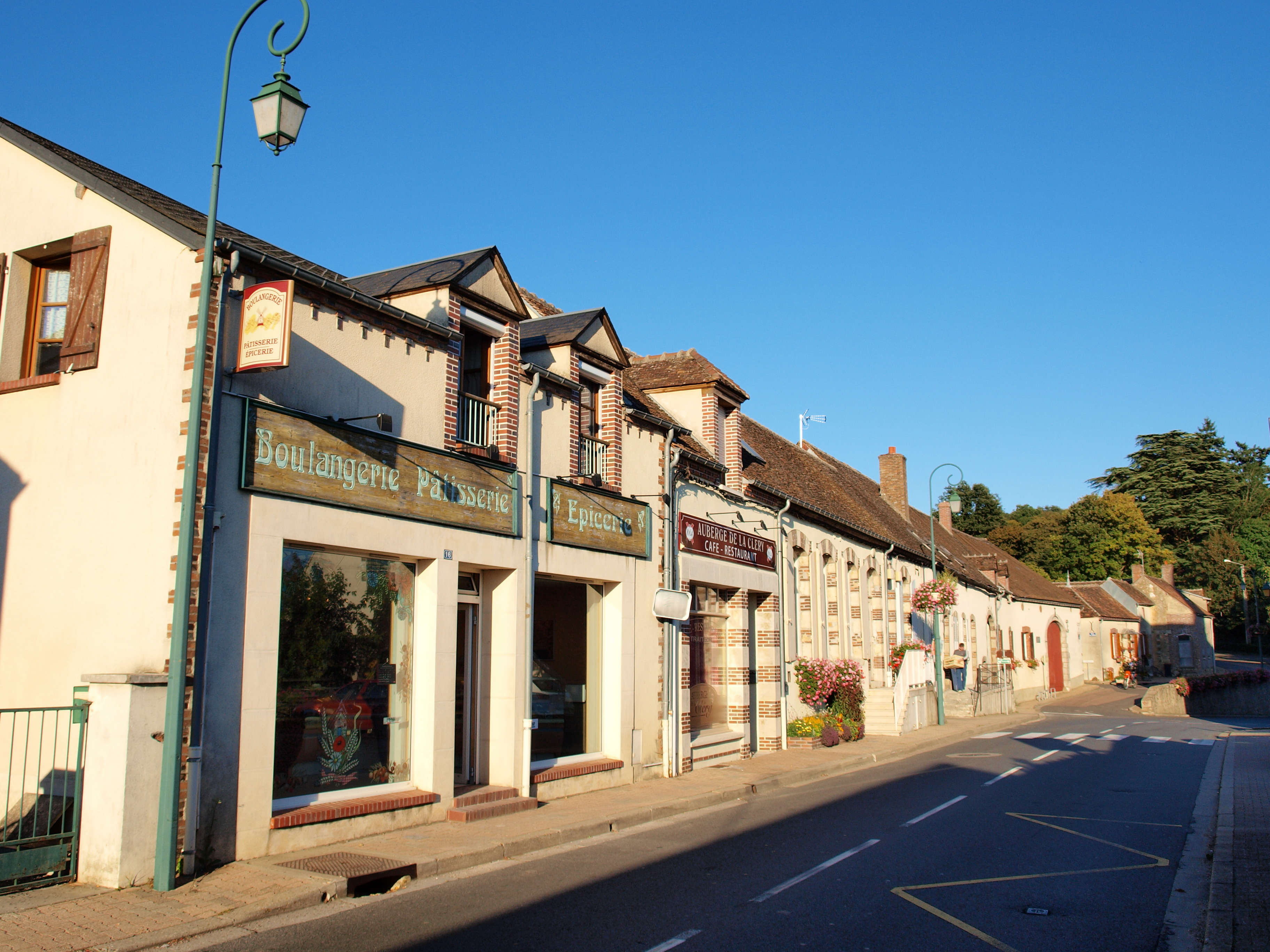 Saint-Hilaire-les-Andrésis (Loiret, France ; commerce